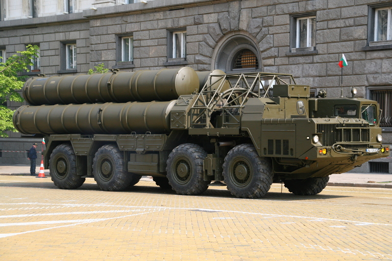 Транспортно-пускова установка, част от зенитно-ракетния комплекс С-300ПМУ (SA-10)